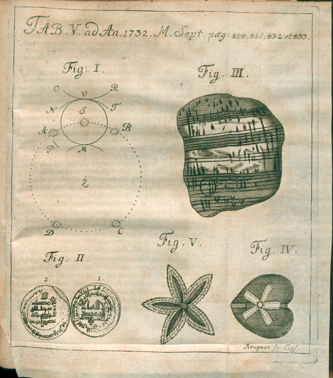 Illustration